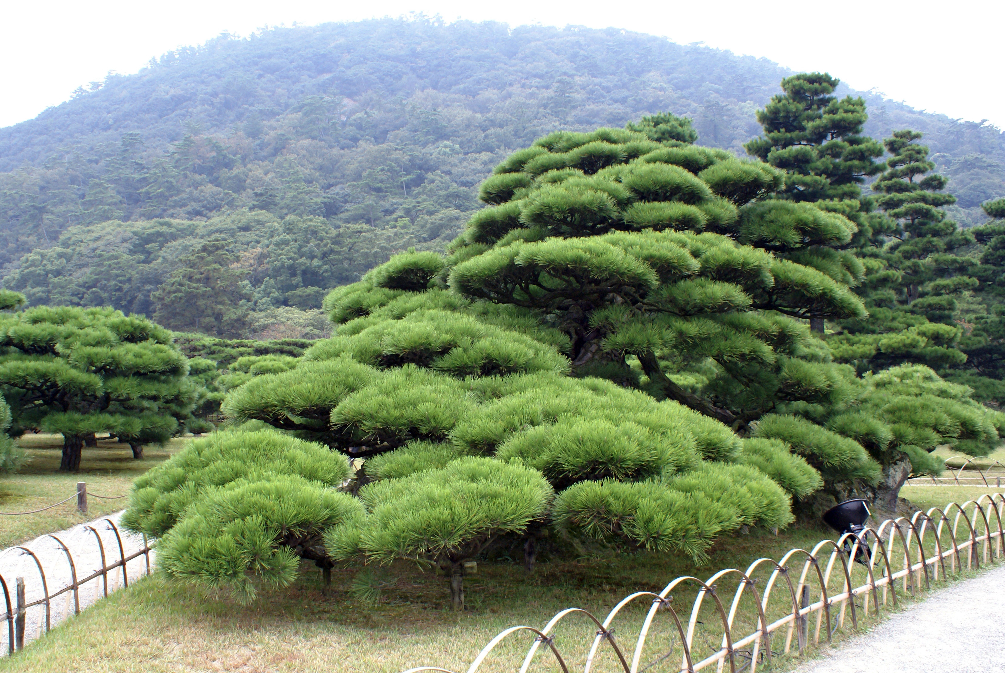 Ritsurin Garden in Takamatsu, Kagawa Prefecture, Japan